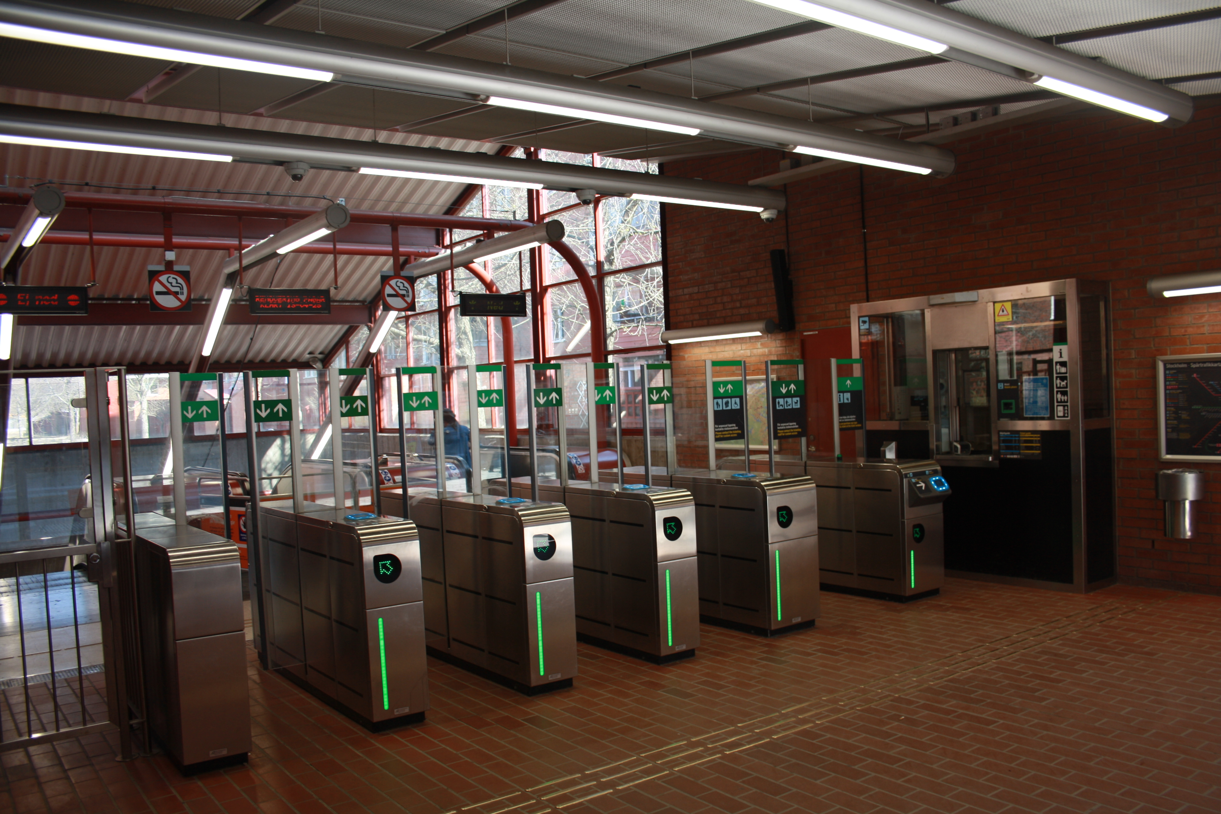 Skarpnäcks tunnelbana